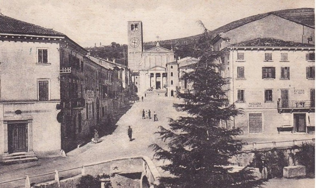 Negrar (provincia di Verona) in una foto d'epoca